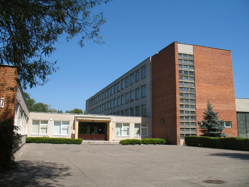 Kauno Jono Žemaičio-Vytauto progimnazija